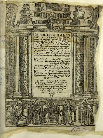 Первая страница "Айсмавурка", издательство Григора Марзванеци, 1706 г., Константинополь